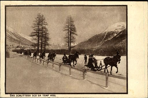 Schlitteda im Oberengadin, anonyme Ansichtskarte von 1919